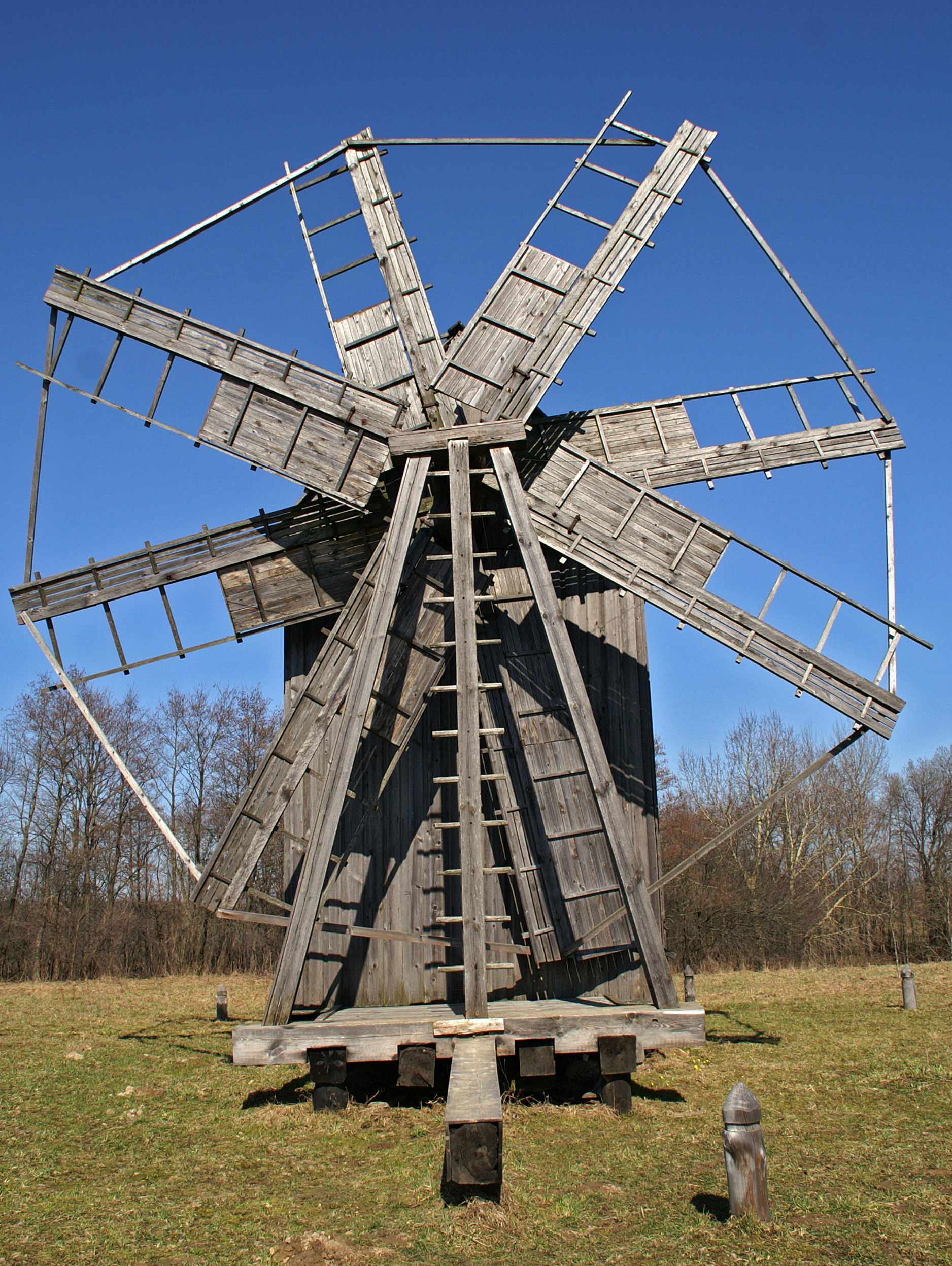 Беларуская (тарашкевіца): Ветраны млын зь в. Янушаўка Мядзельскага раёну Менскай вобласьці. в. Азярцо This is a photo of Belarusian heritage monument. Reference number: 612Г000396 ( WLM)